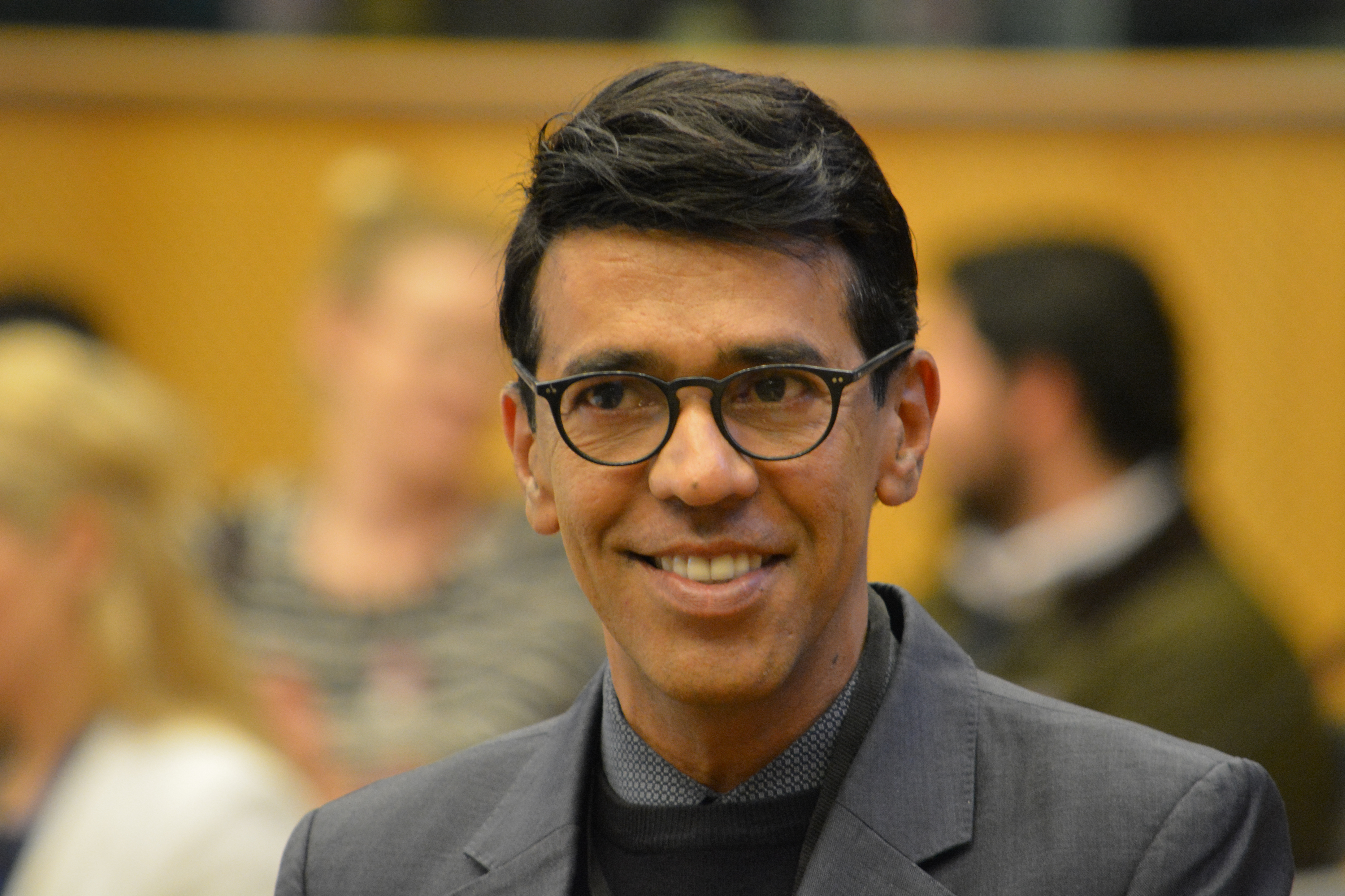 Younous Omarjee